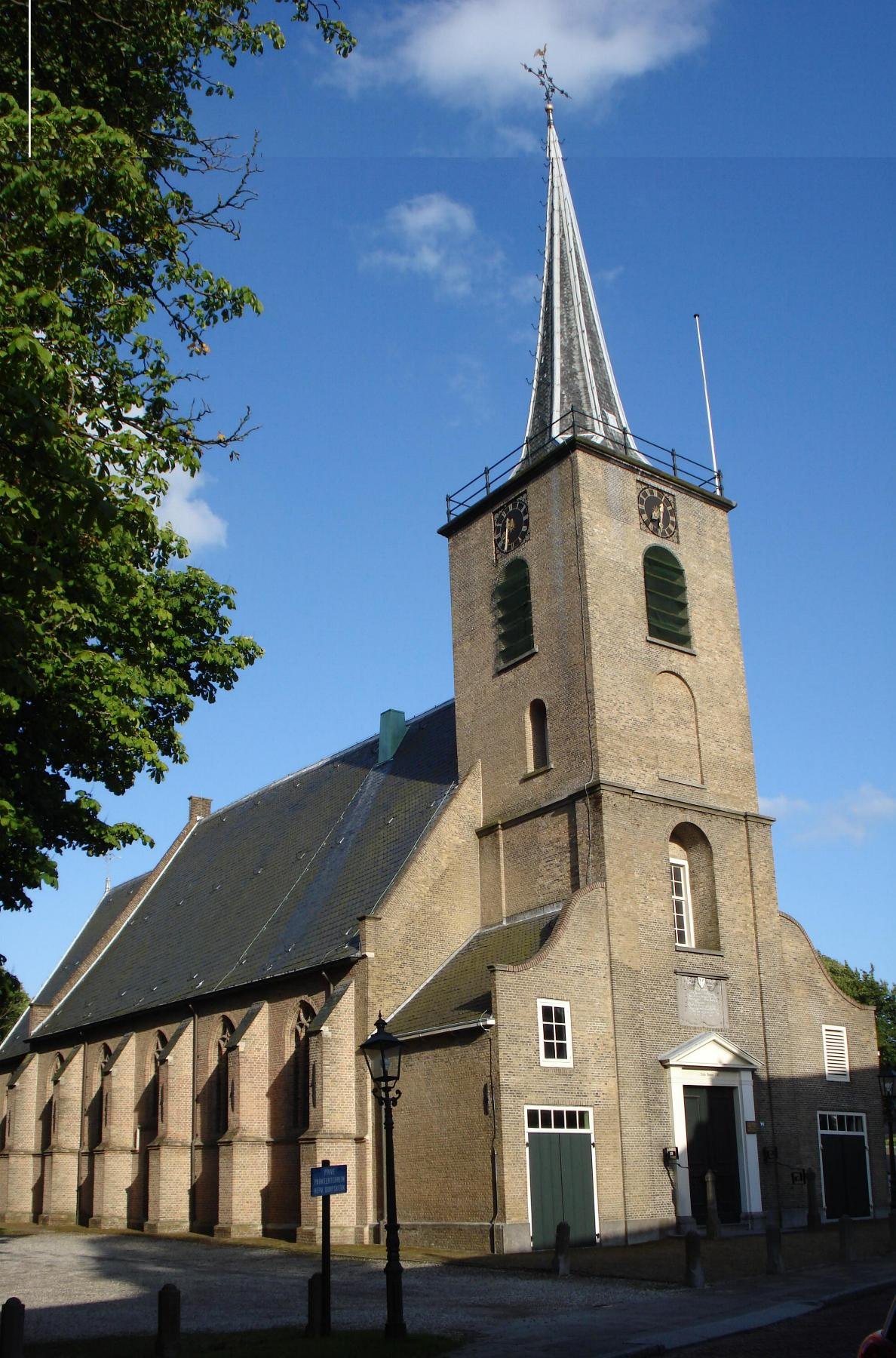 Capelle aan den IJssel, Kerklaan. Kerk.